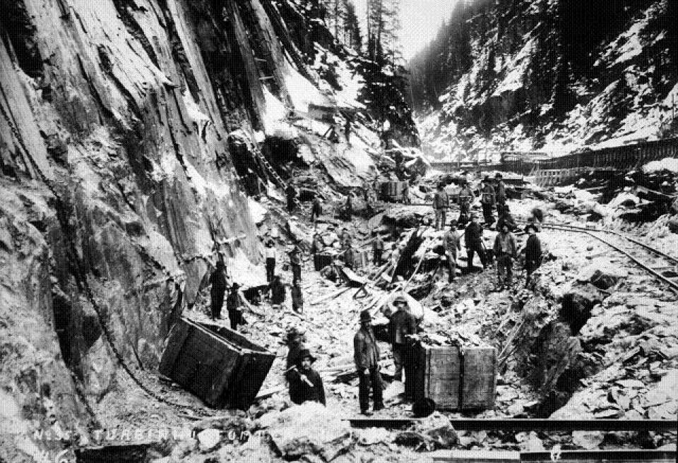 Земляные работы в осушенной горловине реки при строительстве компанией "Norsk Hydro" гидроэлектростанции у водопада Свельгфосс